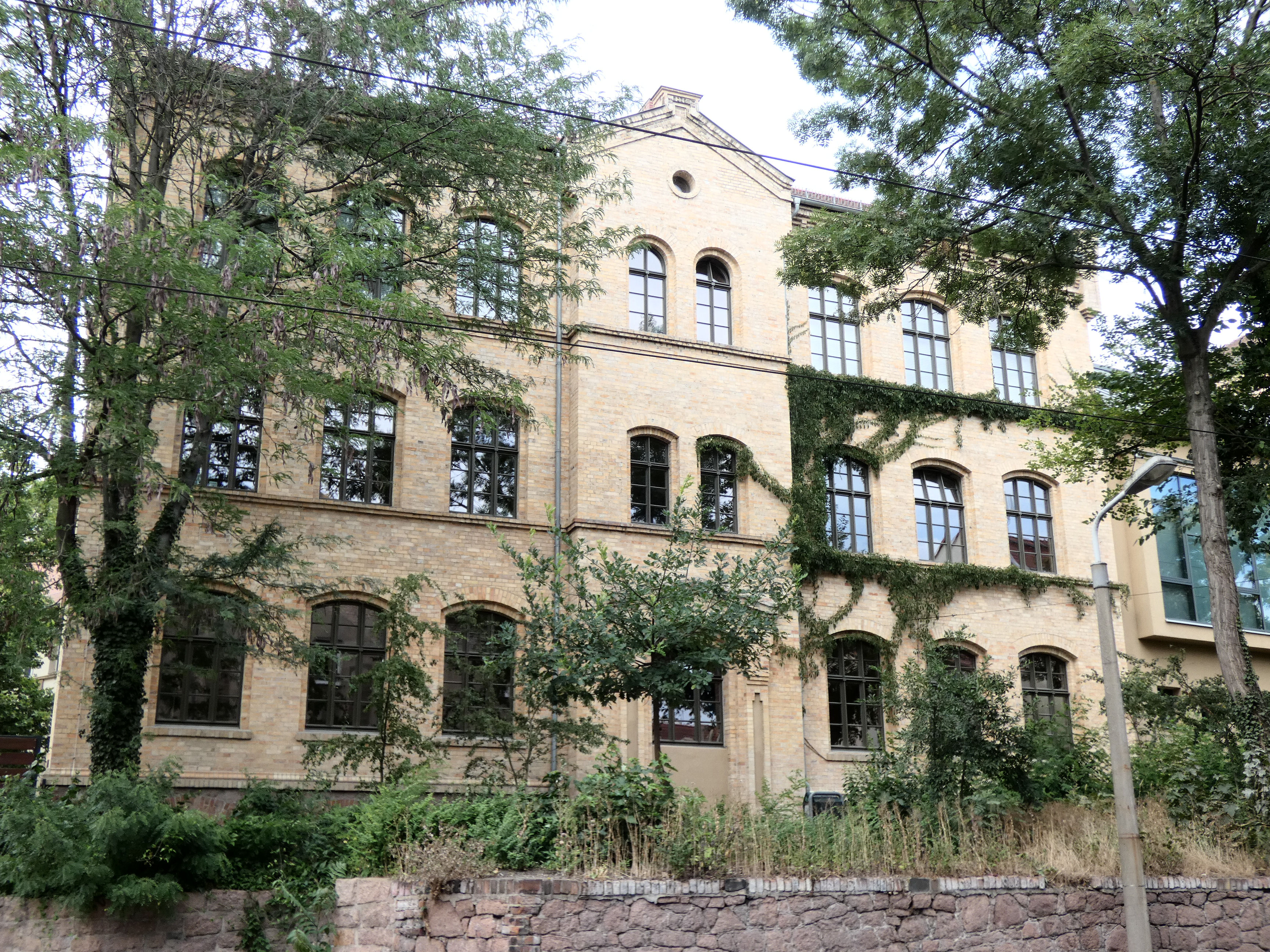 Grundschule Wittekind, Friedenstraße 37, Halle (Saale)